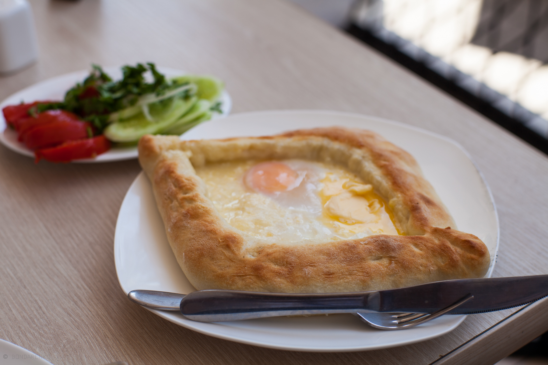 _MG_3020